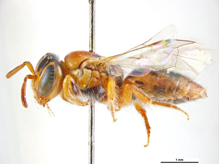 Pachyprosopis trichopoda female